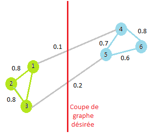 Graphe de données (noeuds, arcs, similarités) pour la classification spectrale